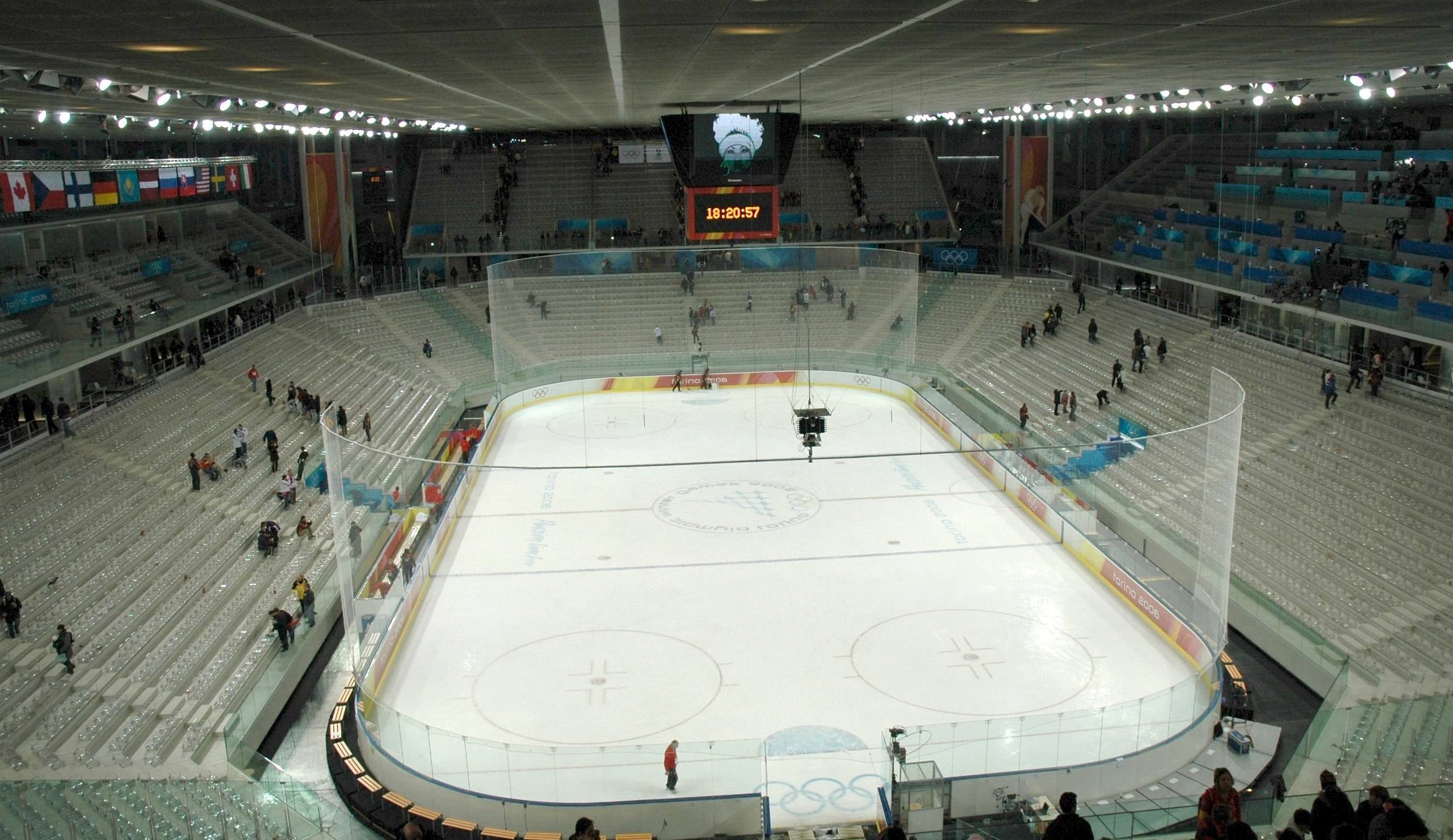 Lo stadio del ghiaccio, Torino, Italia.